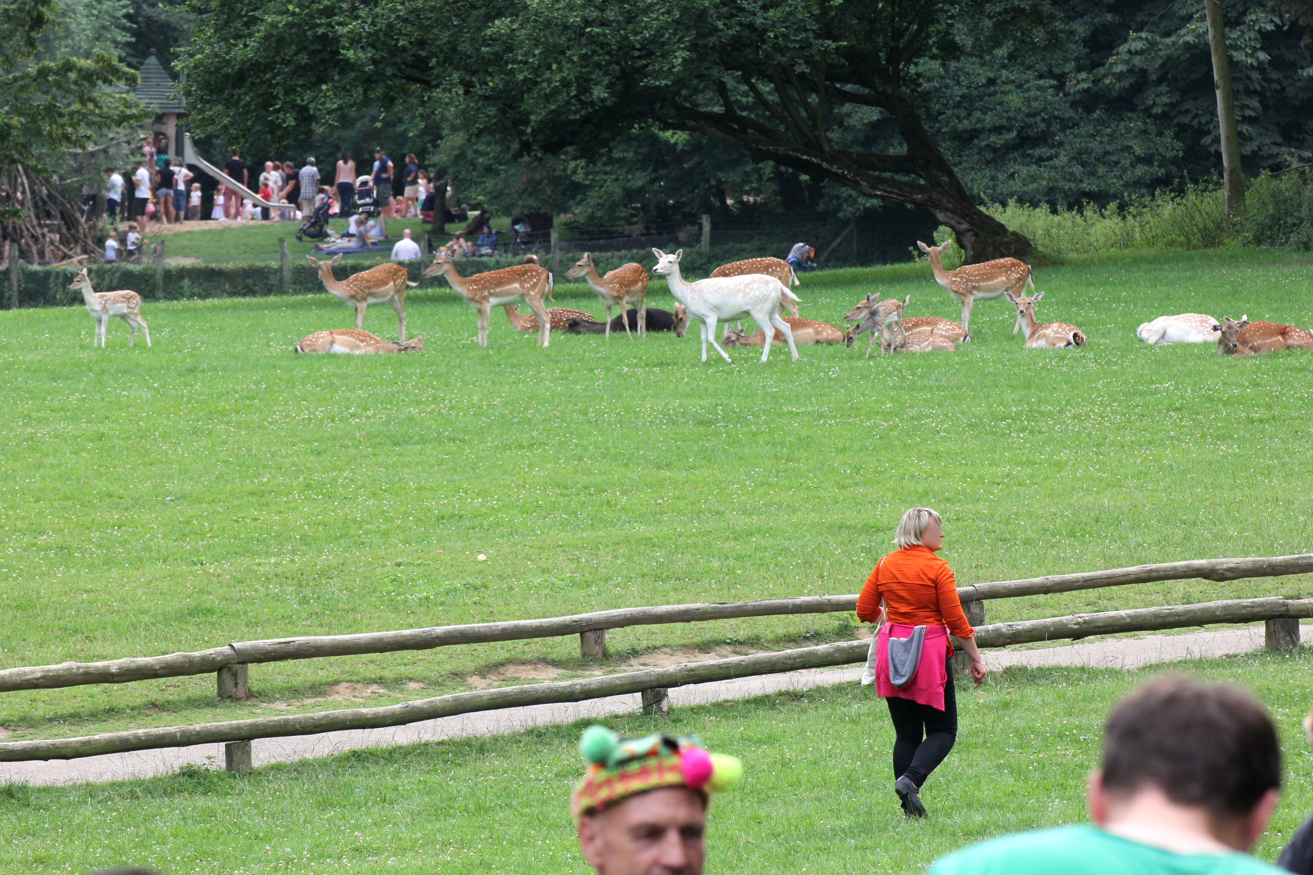 Das Freilaufgehege des Damwilds im Wildpark im Grafenberger Wald, Düsseldorf, während des Sommerfests 2015